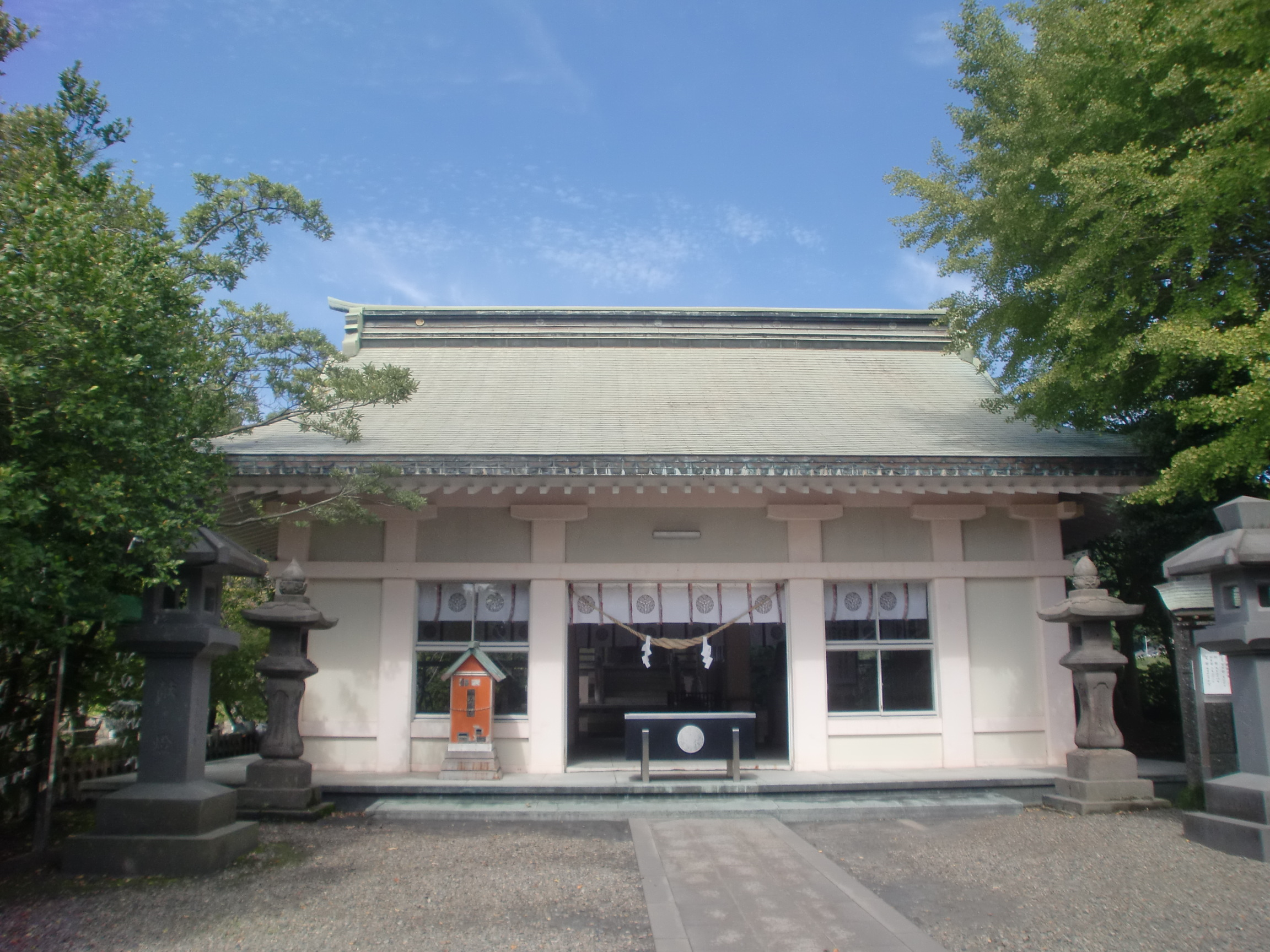 南洲神社の本殿の外観